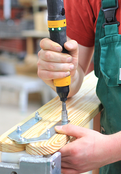 Handgehaltener Elektroschrauber bei der Montage eines Scharniers an einer Holzleiter. Korrekte Verschraubungen sowie Montagefehler, wie defekte Schrauben oder Gewinde, werden dem Mitarbeiter unter anderem über die Leuchtdioden angezeigt.